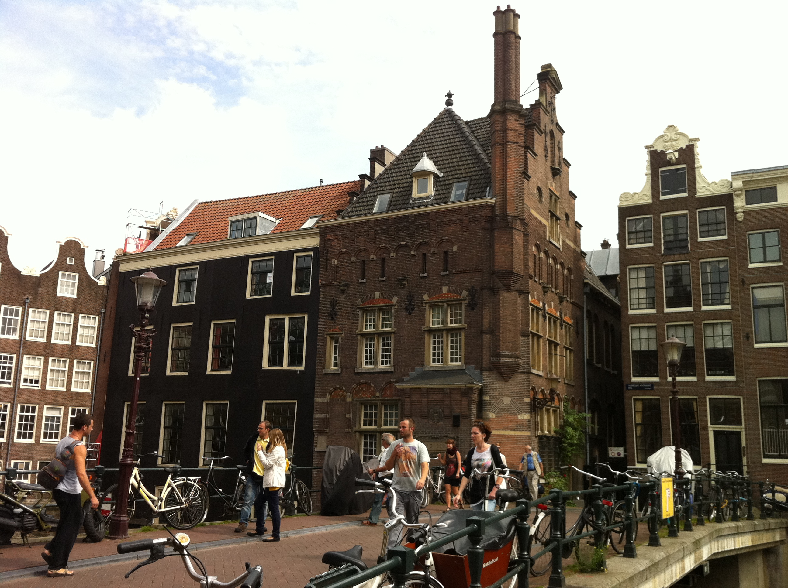 Huize Vredenburgh, Vredenburgersteeg 1 Amsterdam. Panden deels uit de 15e en 16e eeuw, aanbouw uit 1890 van architect A.C. Bleijs